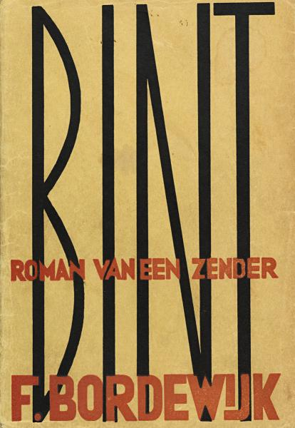 Omsag van de roman Bint van de Nederlandse schrijver F. Bordewijk. Het ontwerp is naar alle waarschijnlijkheid in 1934 gemaakt door Andries Oosterbaan (1882-1935). Zie Lex van de Haterd: Van boekbinder tot grafisch vormgever. In: Zacht Lawijd 3: 1 (2003)